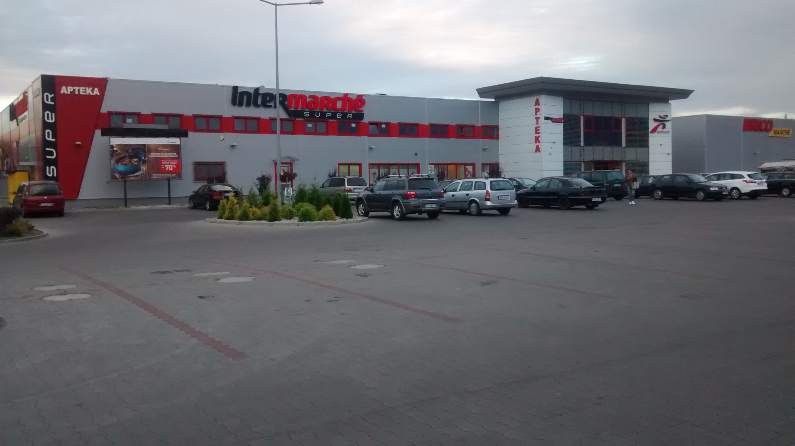 Intermarche i Bricomarche w Skierniewicach